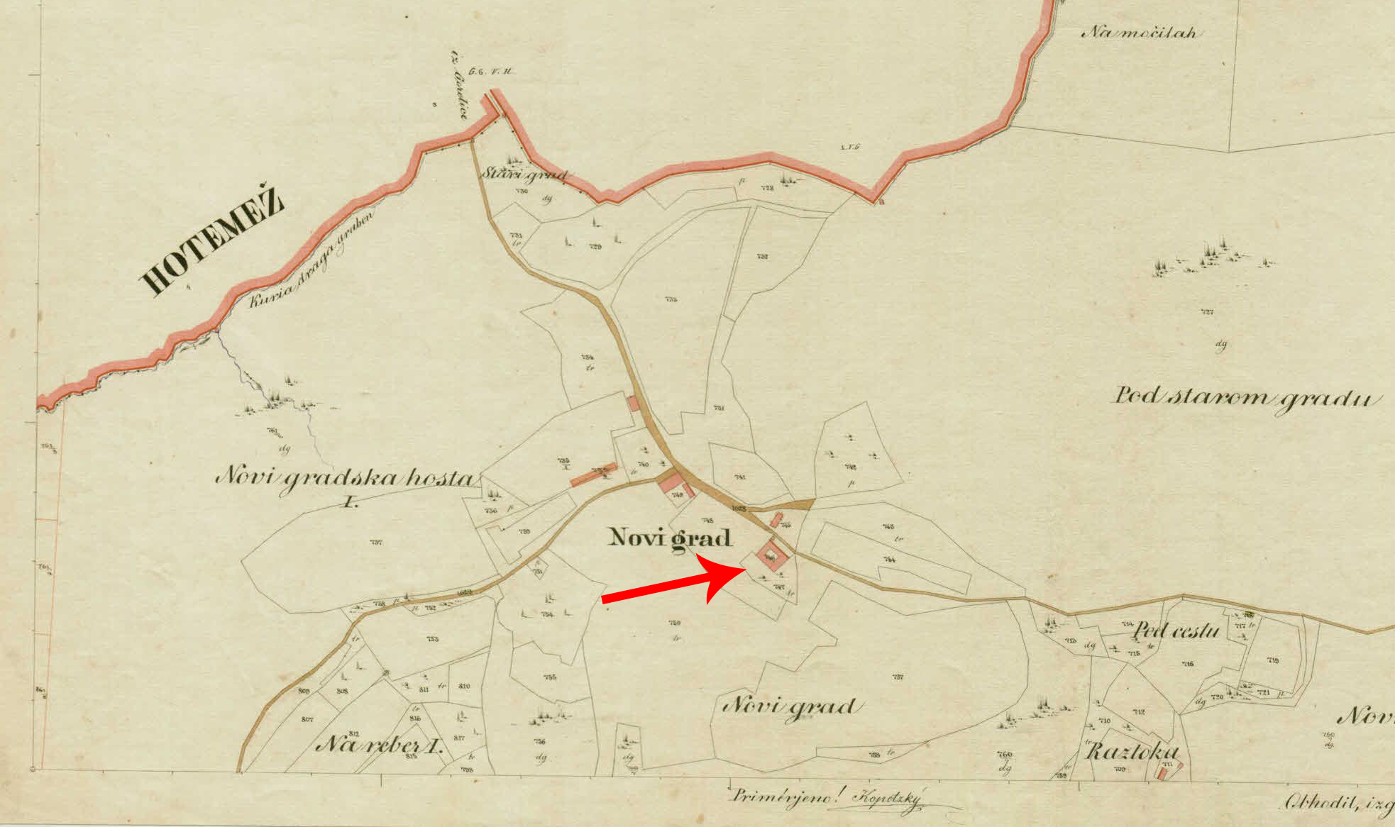 Reambulančni kataster za Kranjsko, 1867-1882